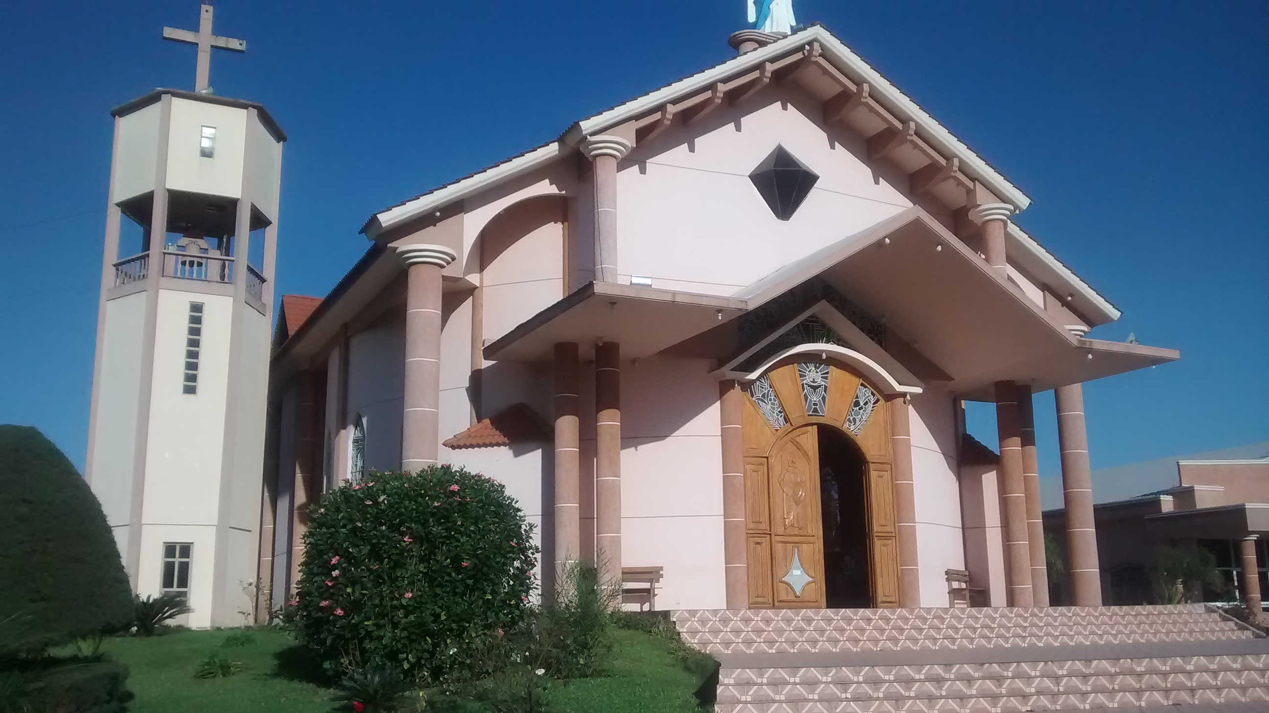 Visão externa da catedral de Ametista do Sul